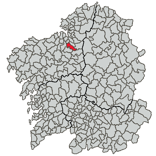 Mapa coa localización do concello de Oza dos Ríos